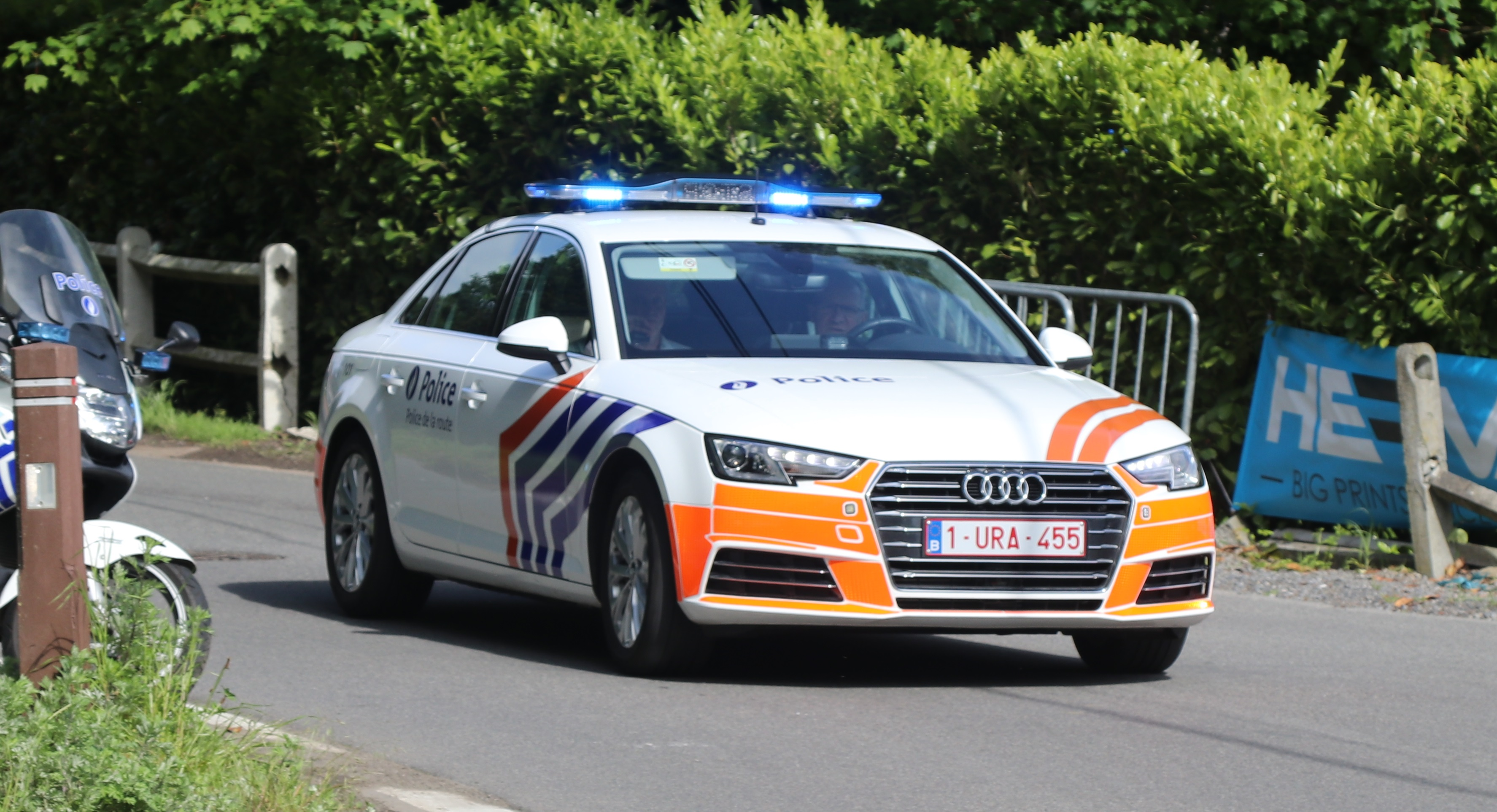 Audi de la police fédérale au Circuit de Wallonie 2019 à Nalinnes Belgique